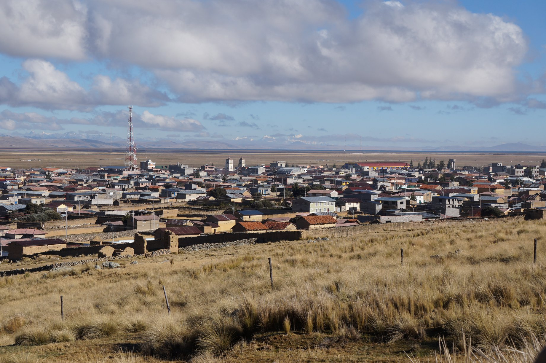 Vista Panoramica de Junín